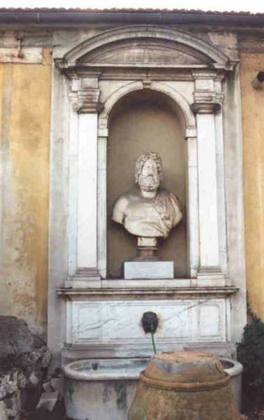 Busto in marmo raffigurante Esculapio, scolpito da Antonio Gino Lorenzi da Settignano (seconda metà del XVI secolo), situata nel Giardino dei Semplici di Firenze.